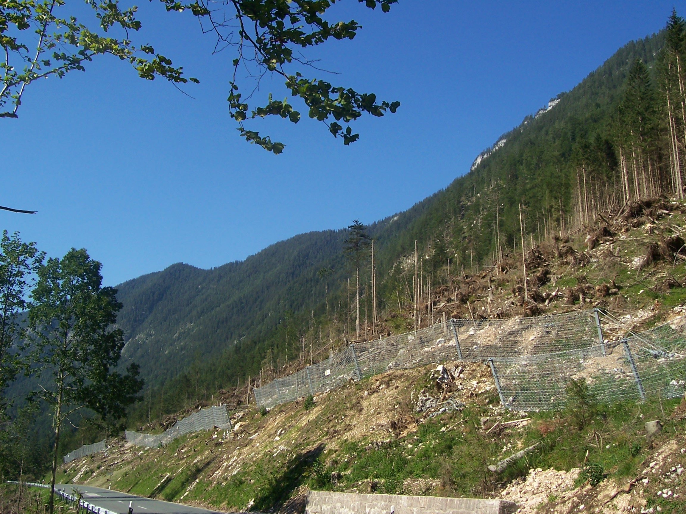 B 305 mit Sturmschäden von Orkan Kyrill im Bereich der Weißwand Bei Verwendung bitte ich hier um einen Hinweis, wo das Foto genutzt wird.